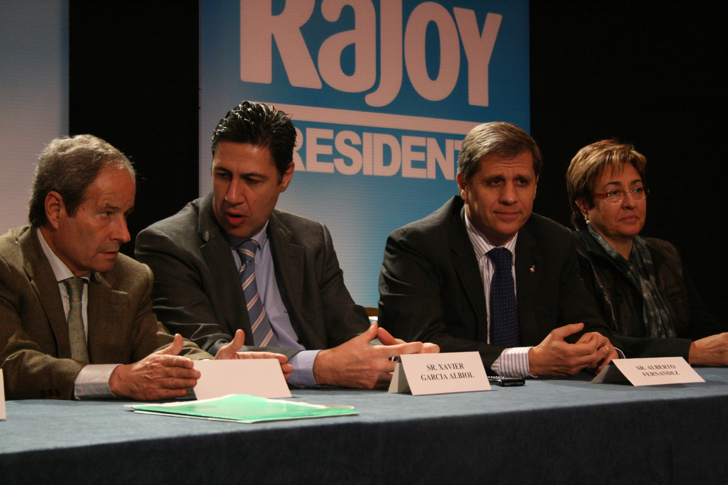 Albert Fernández Díaz entre altres conferenciants